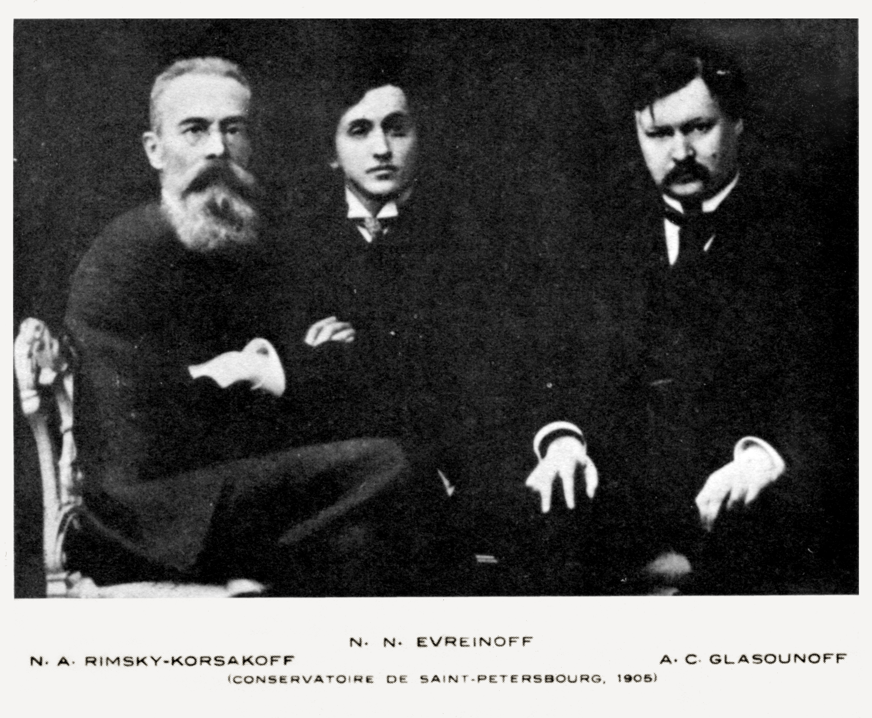 Копия иллюстрации (открытки) "Н.А.Римсский-Корсаков, Н.Н.Евреинов и А.К.Глазунов. Санкт-Петербургская консерватория. 1905"